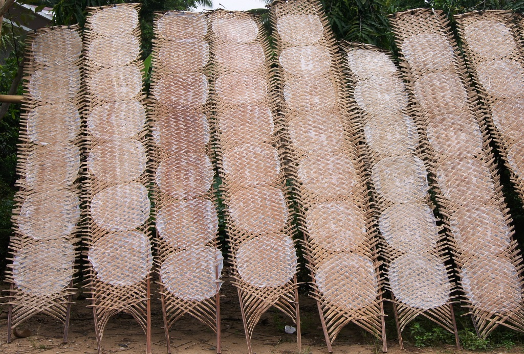 Bánh Tráng đặc sản của Cù Lao Mây thuộc huyện Trà Ôn, Vĩnh Long, Việt Nam